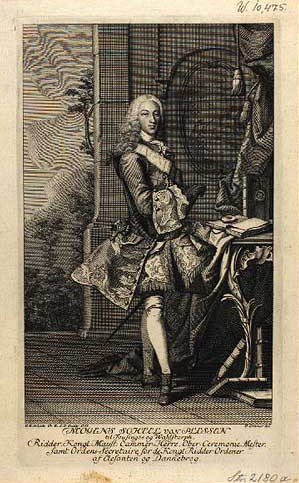 Mogens Scheel von Plessen (1713-1749), Danish nobleman, landowner, and courtier